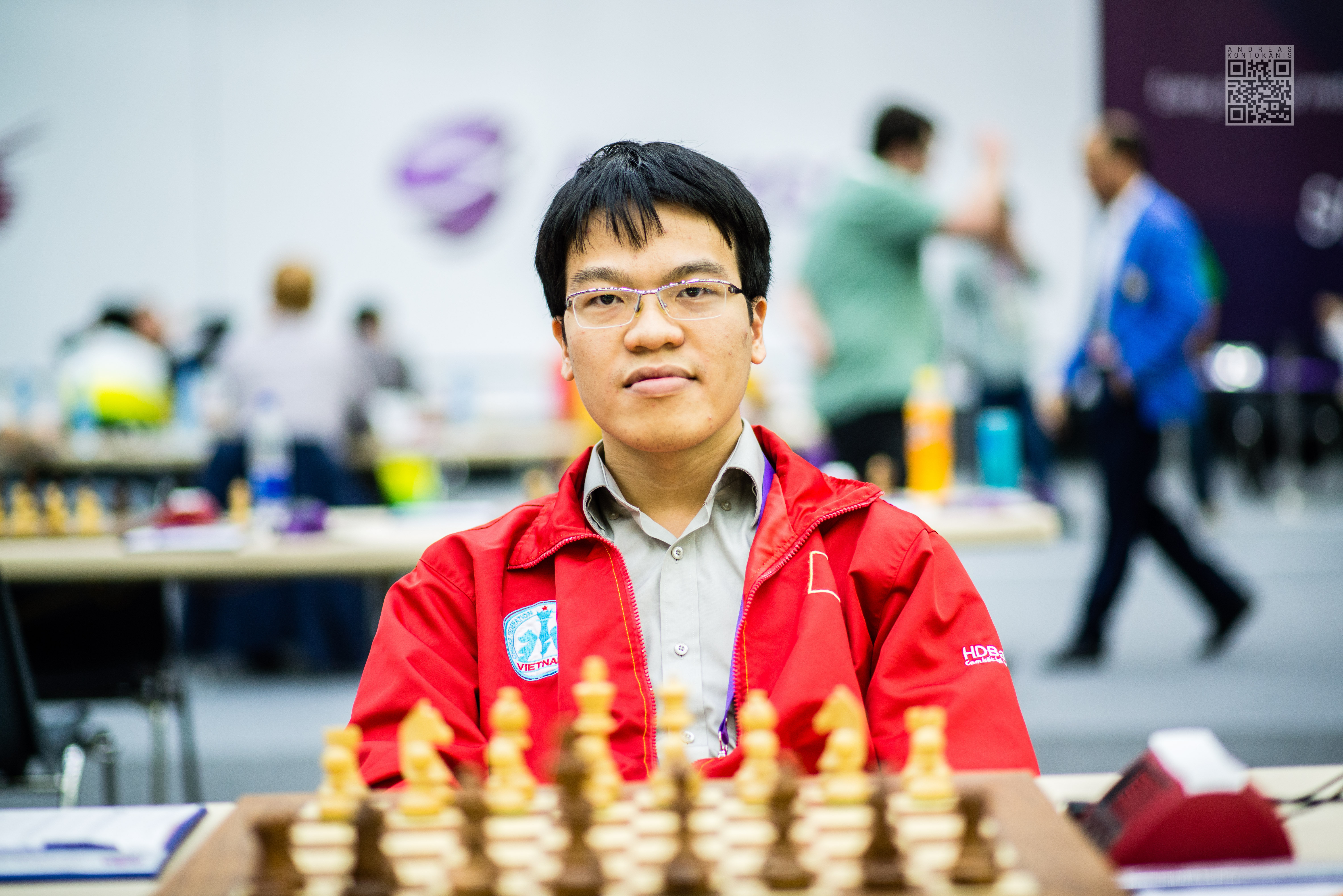 Le Quang Liem